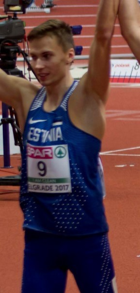 513 hep ereronde